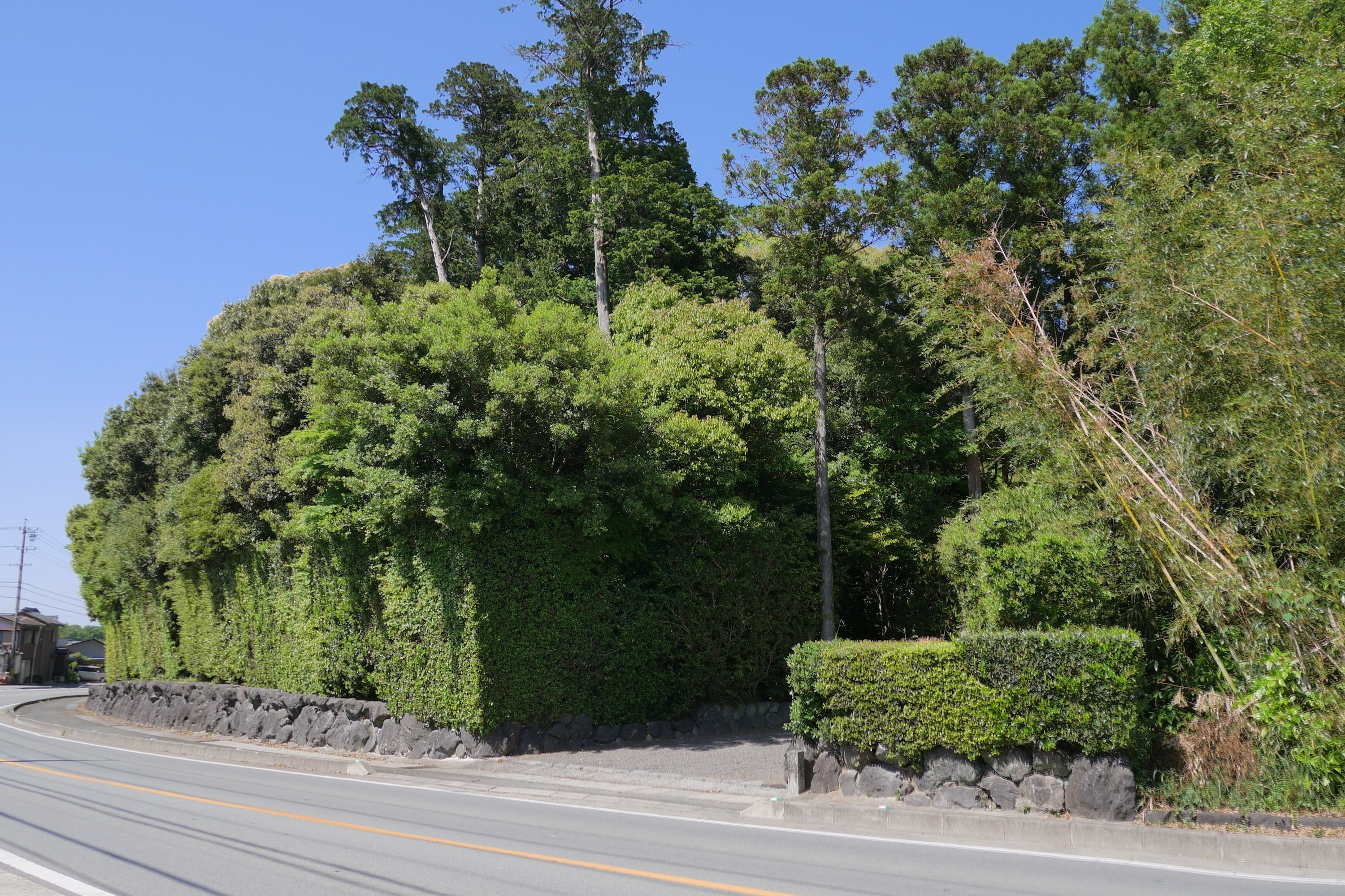 日本の三重県伊勢市にある皇大神宮摂社の園相神社（そないじんじゃ）の社叢と三重県道22号伊勢南島線。